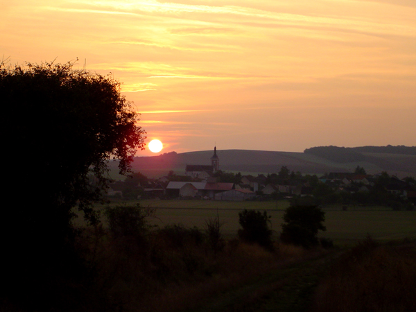 Couché de soleil sur Brion (photo C. MOCQUET - 09/2006)